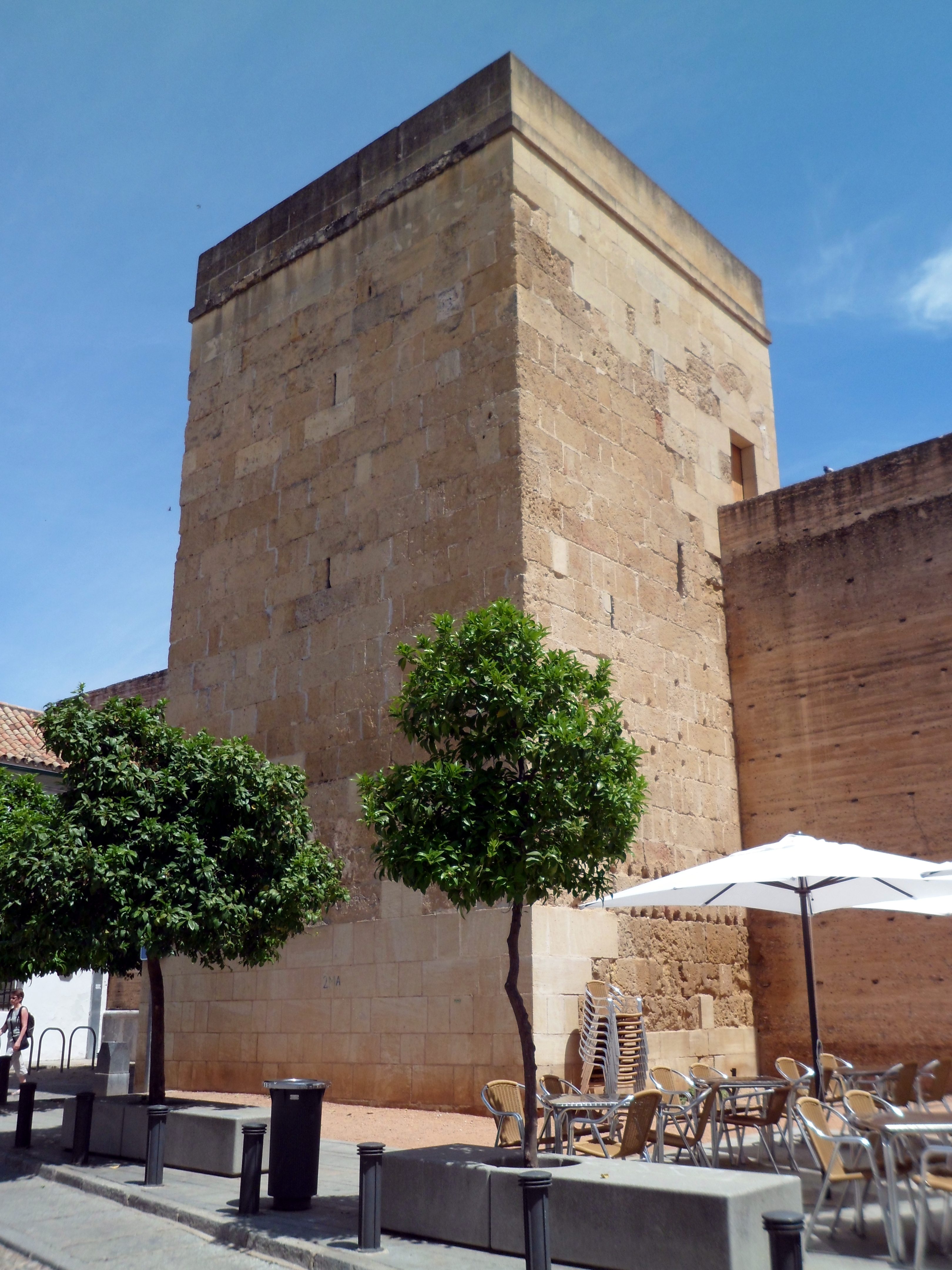 Torre de Belén, Córdoba (España).